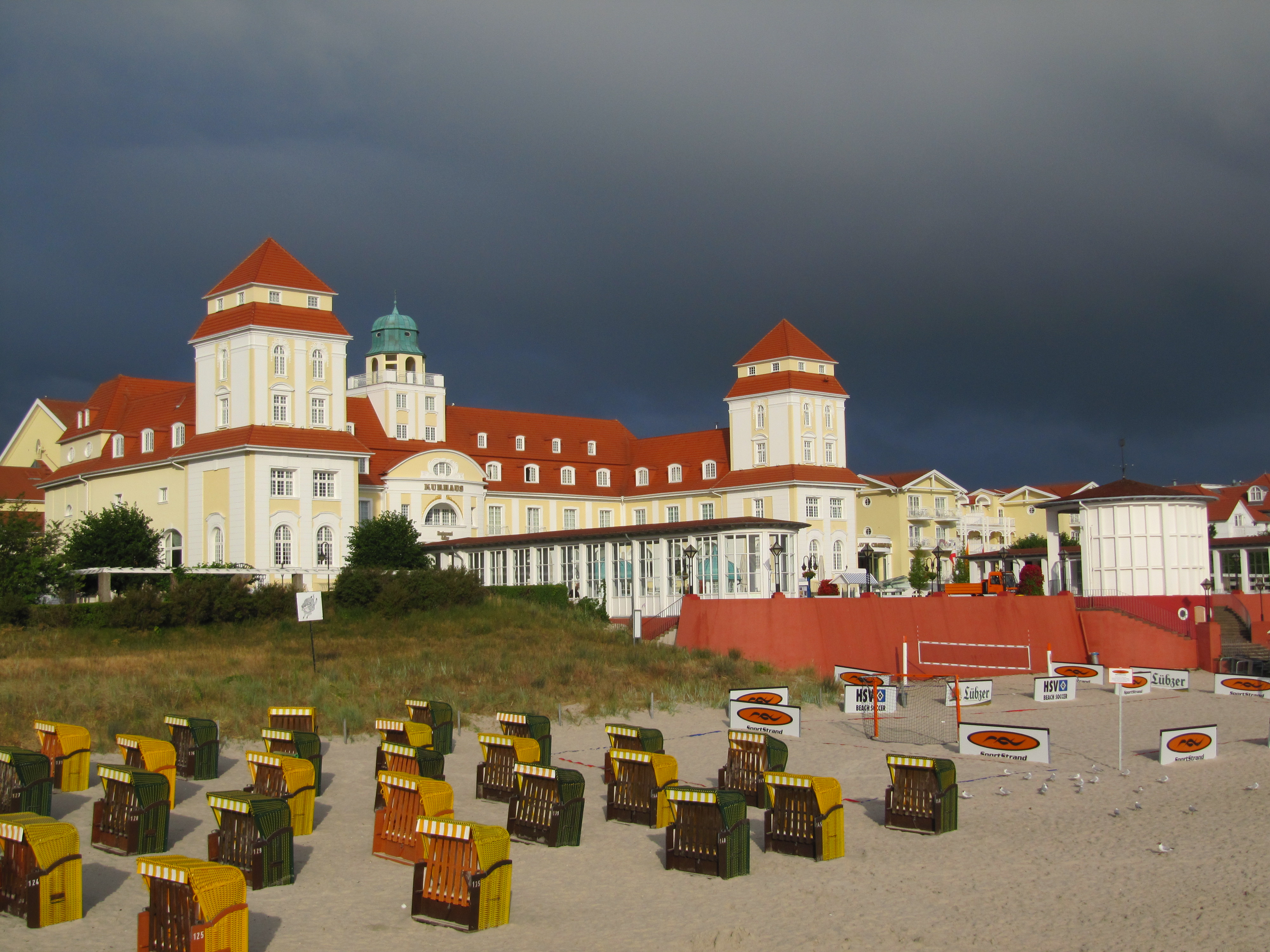 Plage de Binz sur la Baltique, Allemagne